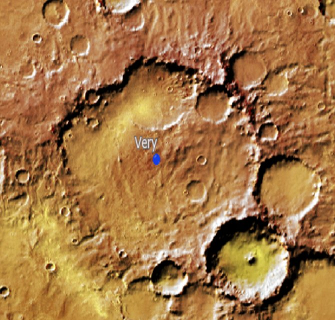 Cráter marciano Very. (Imagen IAU/USGS/Goddard/A SU/USGS)